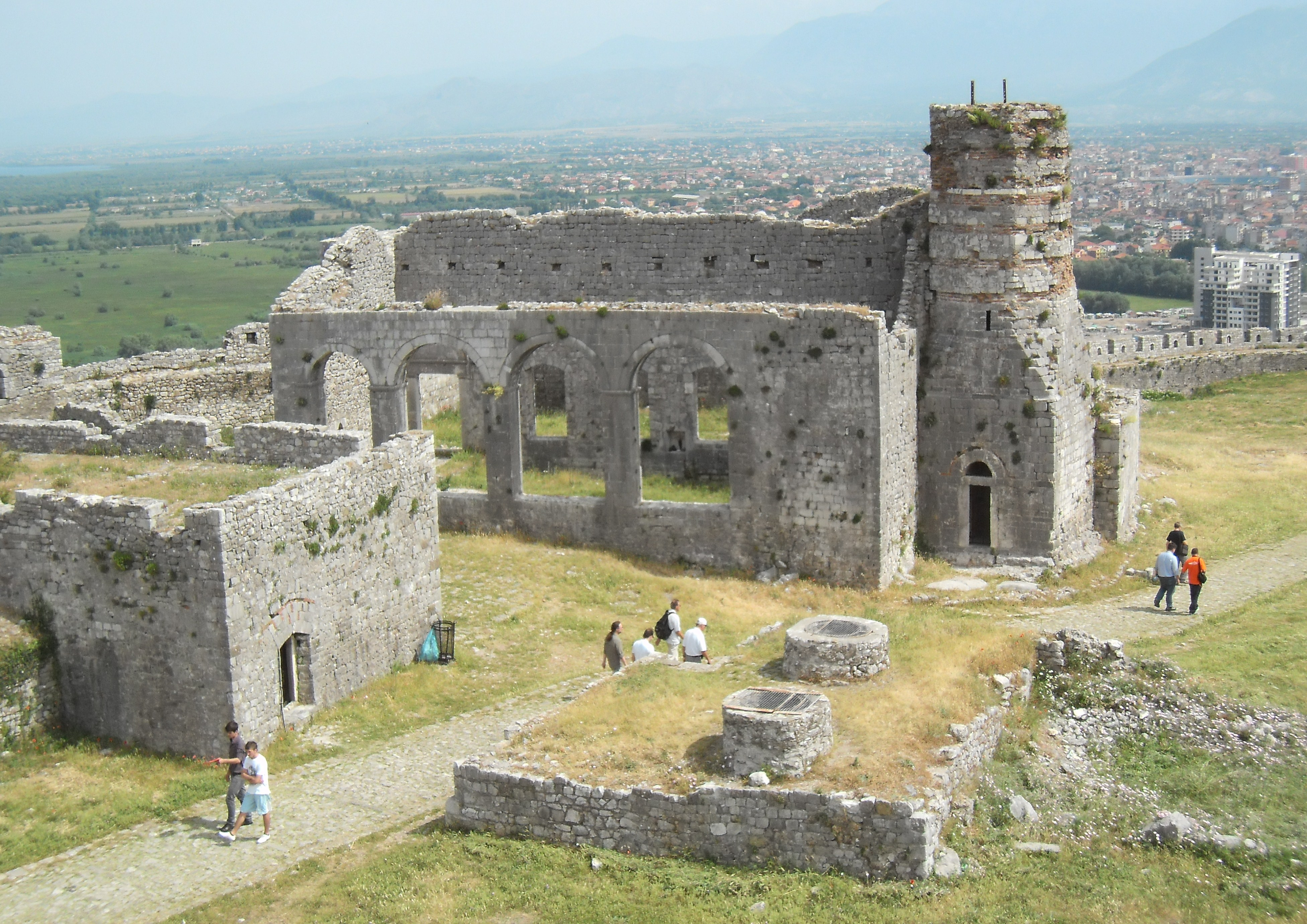 Ruine der kath. Kathedrale Sankt Stephan (früher: Moschee) auf der Burg Rozafa bei Shkoder